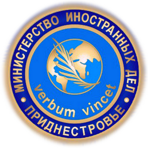 Эмблема Министерства иностранных дел ПМР